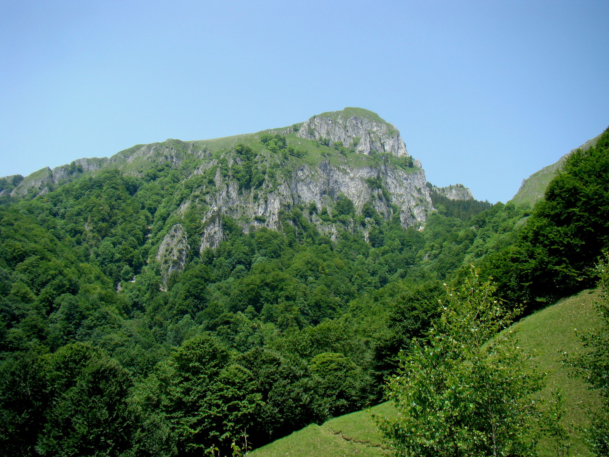 Bara de calcar, PN Buila-Vanturarita